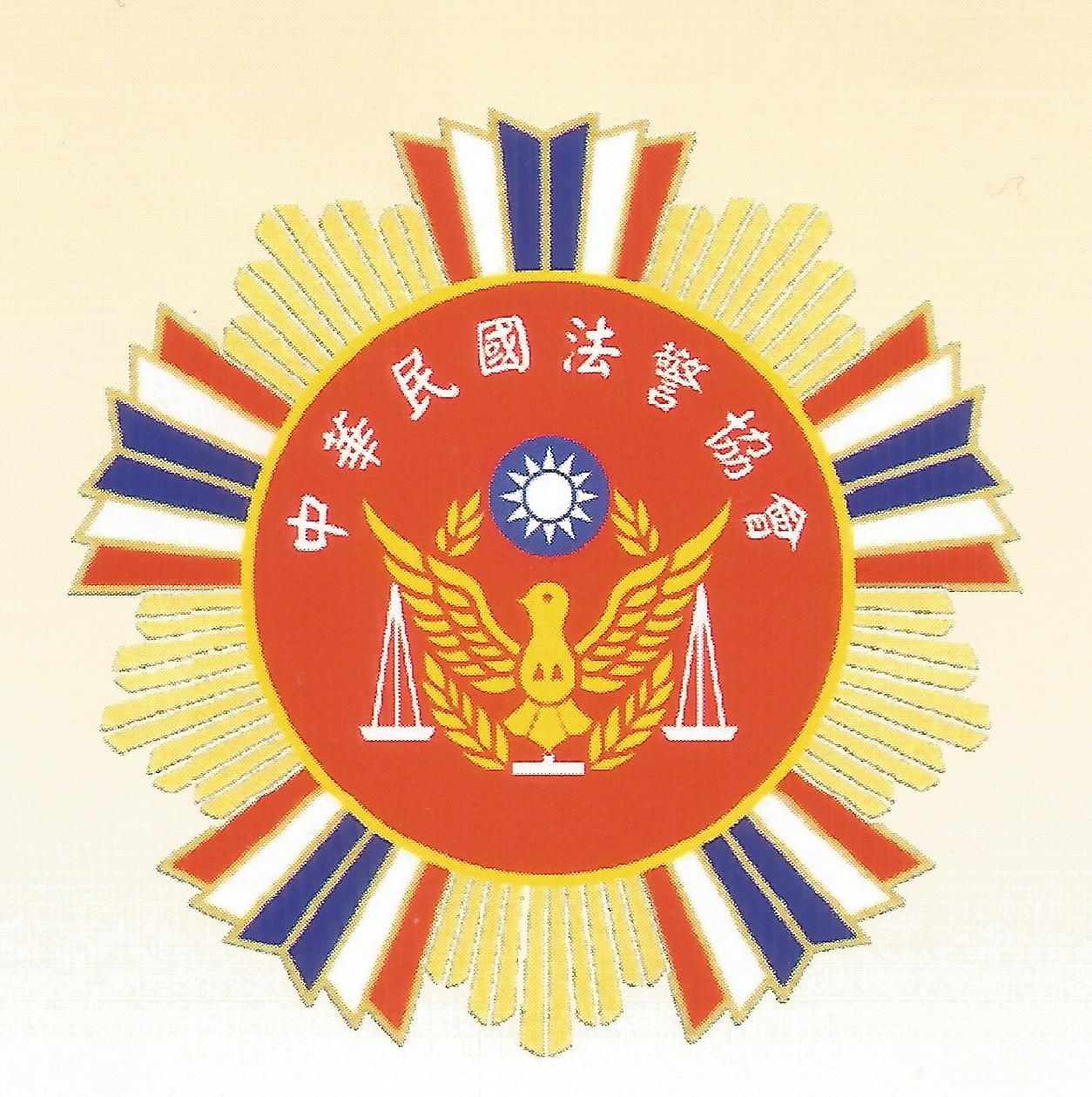 中華民國法警協會會徽。